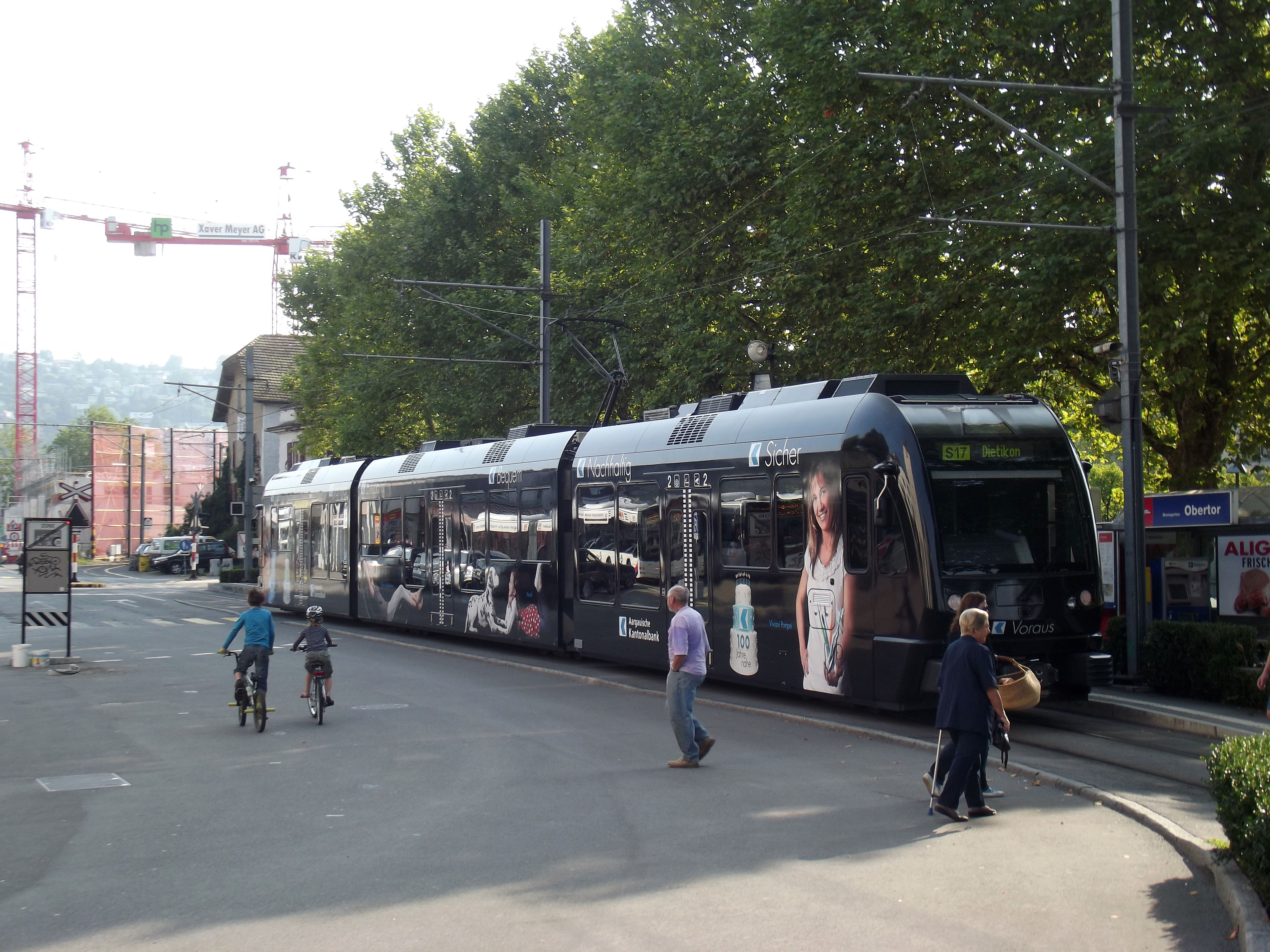 S17 S-Bahn: Metersporige regionaal spoorlijn tussen Dietikon en Wohlen. Halte Obertor